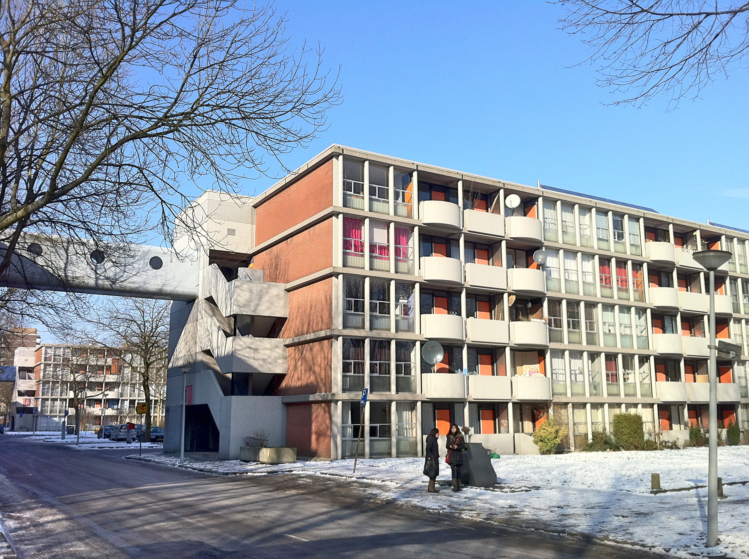 Amsterdam. Amsterdam - Het Breed. Architect Van Gool